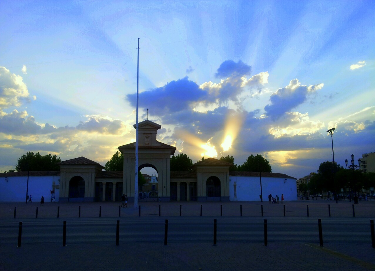 Iron gate of Albacete Feria, Puerta de Hierros de la Feria de Albacete